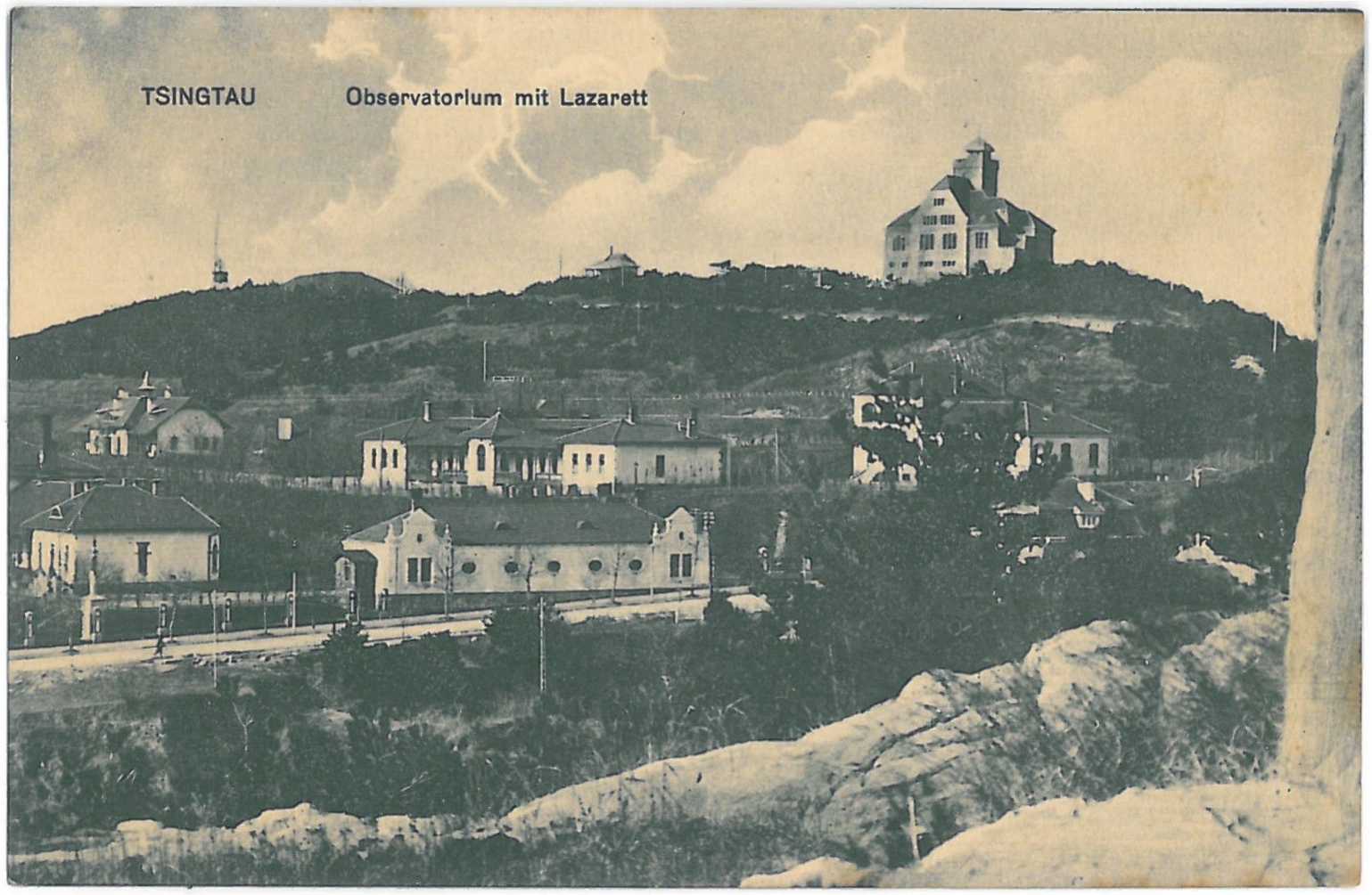 青岛督署医院东侧及观象台